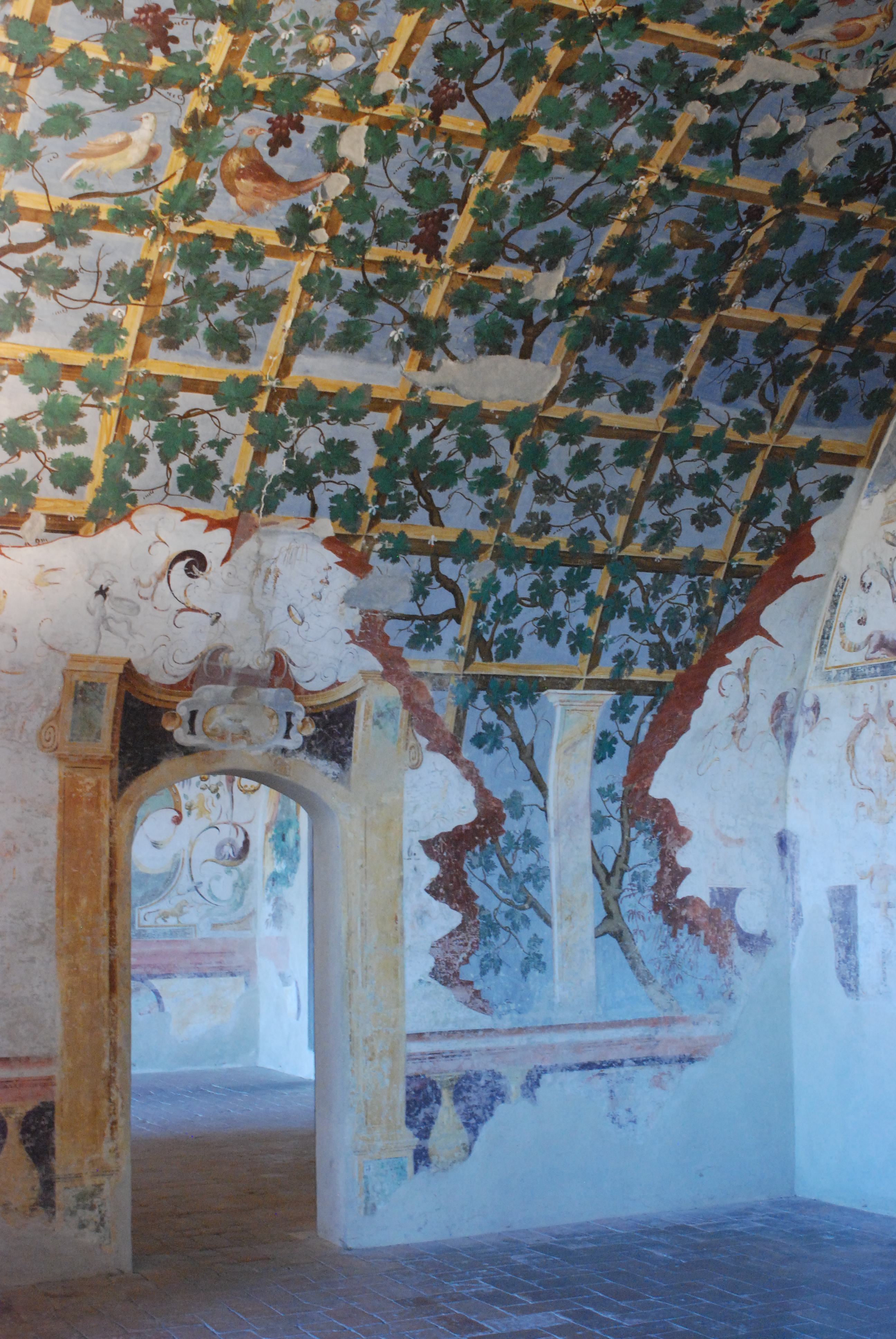 Castello di Torrechiara - MIBAC una delle stanze affrescate This is a photo of a monument which is part of cultural heritage of Italy.